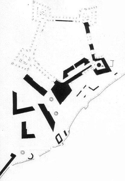 Pianta della Real Cittadella spagnola a Messina.